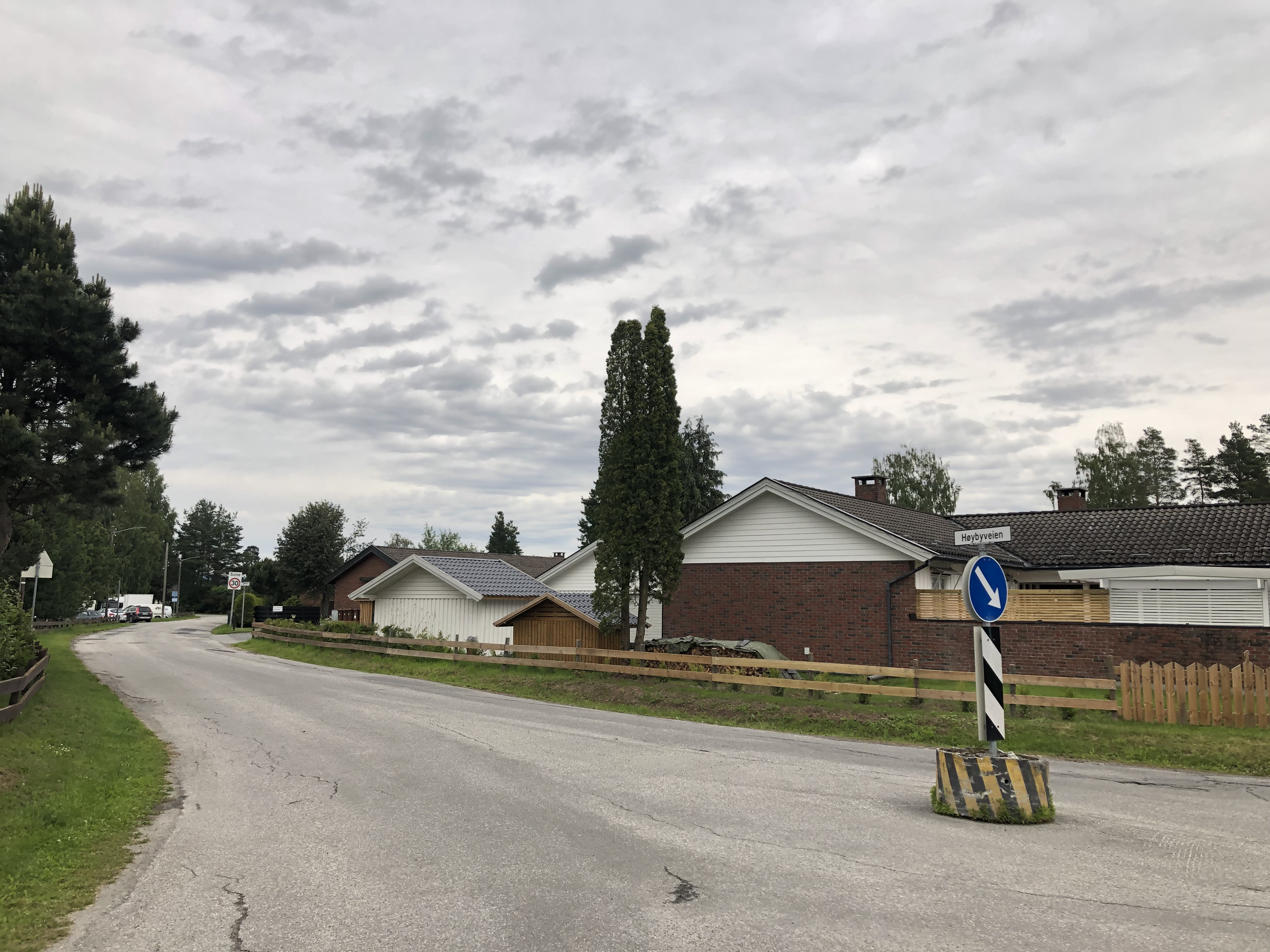 Høybyveien i Hønefoss, sett fra krysset Ringveien.